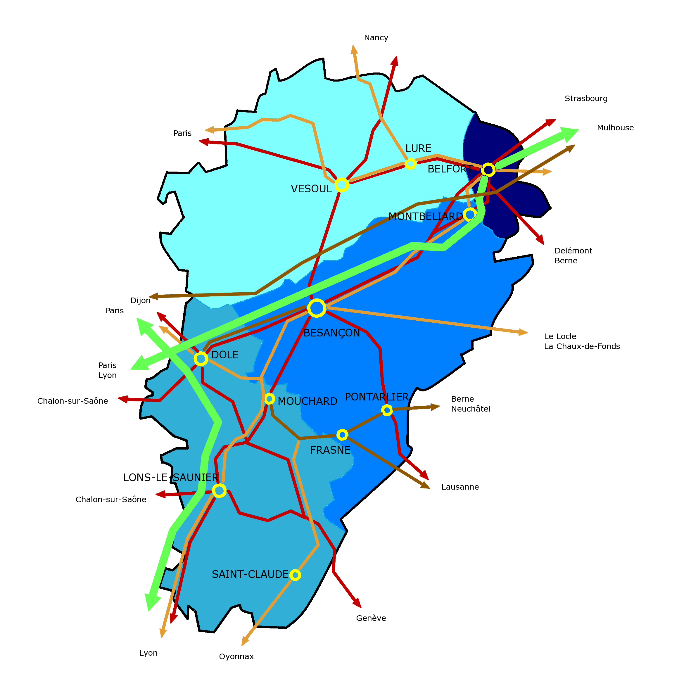 Plan de la région Franche-Comté en grand format mis à jours avec le tracé de la LGV.